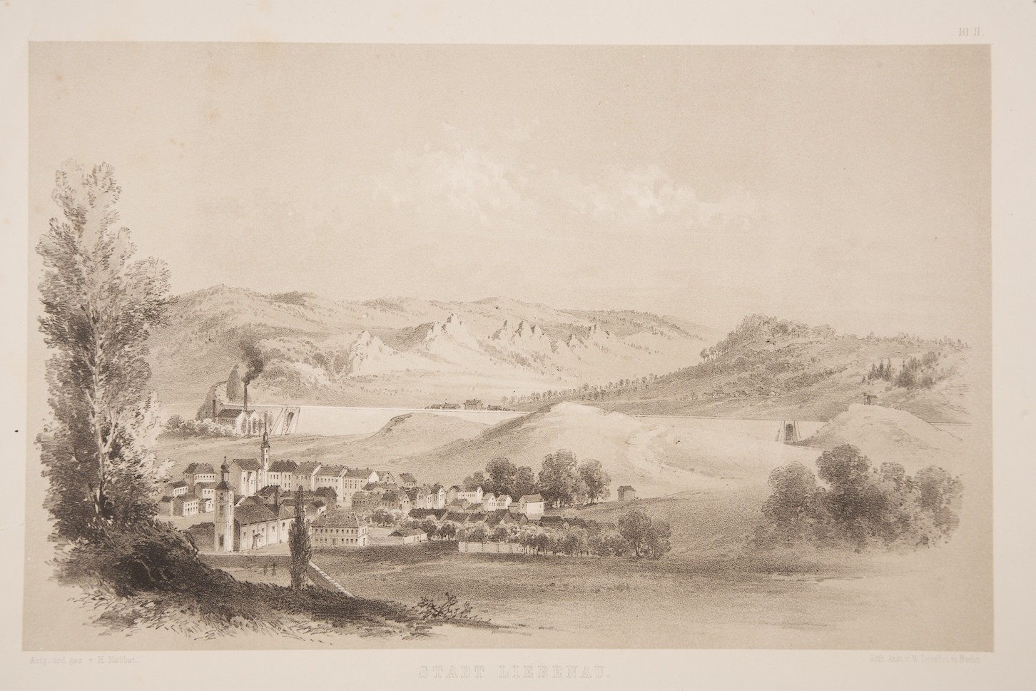 Pohled na Hodkovice (Liebenau, 1868) z práce Hermann Nabbat - Johannes Lemcke. Die Sieges-Strasse der Preussen.